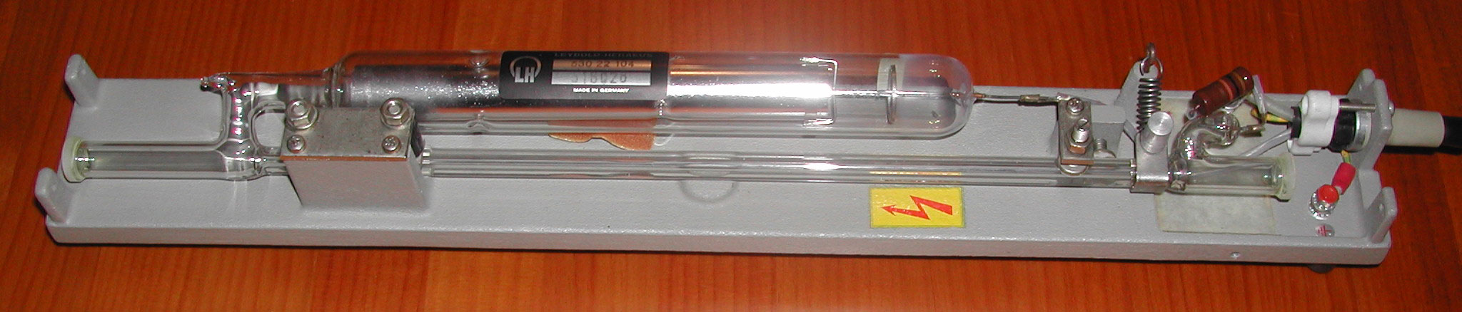 Helium-Neon-Laser (Resonatorlänge etwa 30cm)